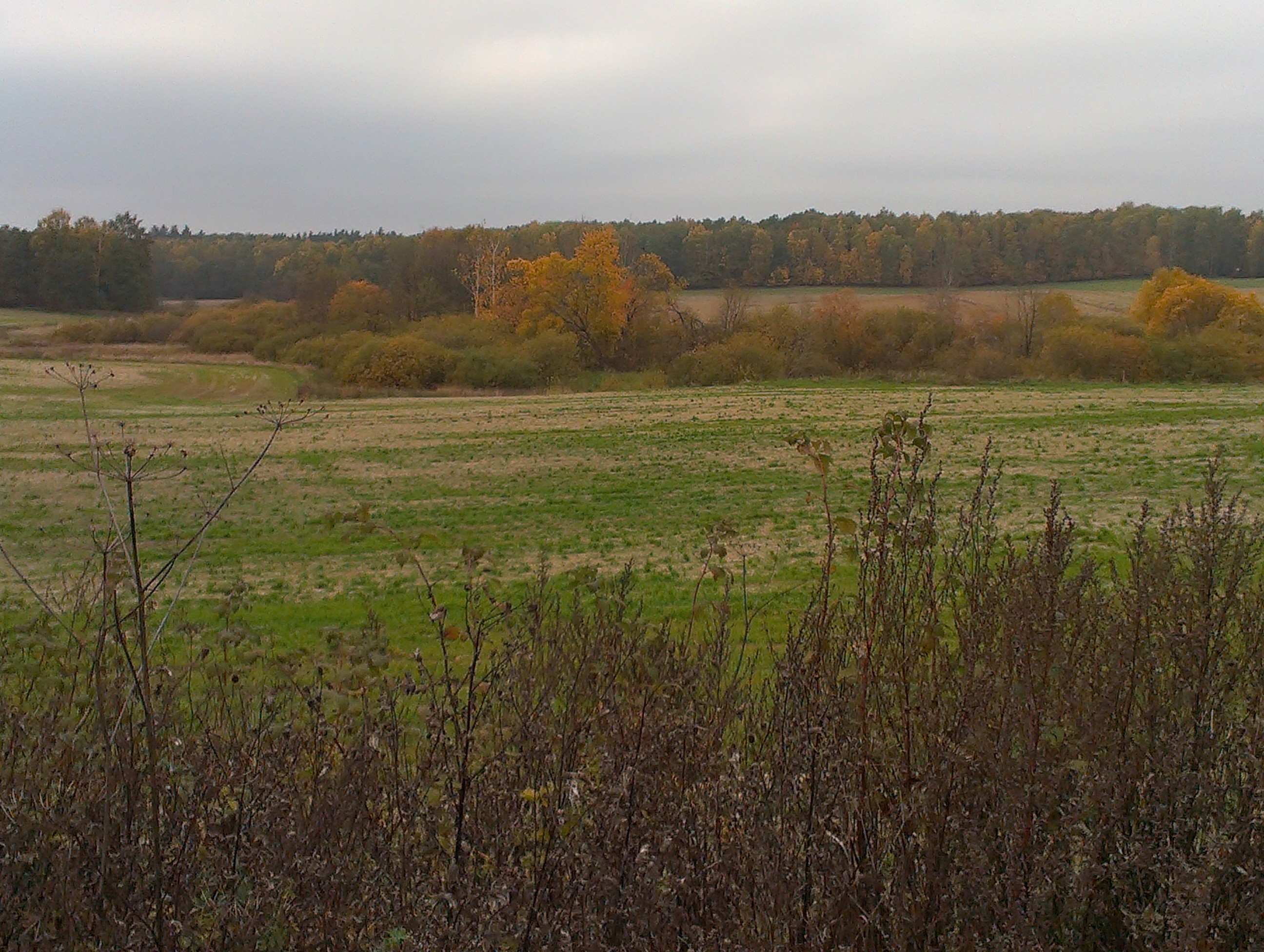 widok na las pod Gudnikami, Gm. Korsze, PL